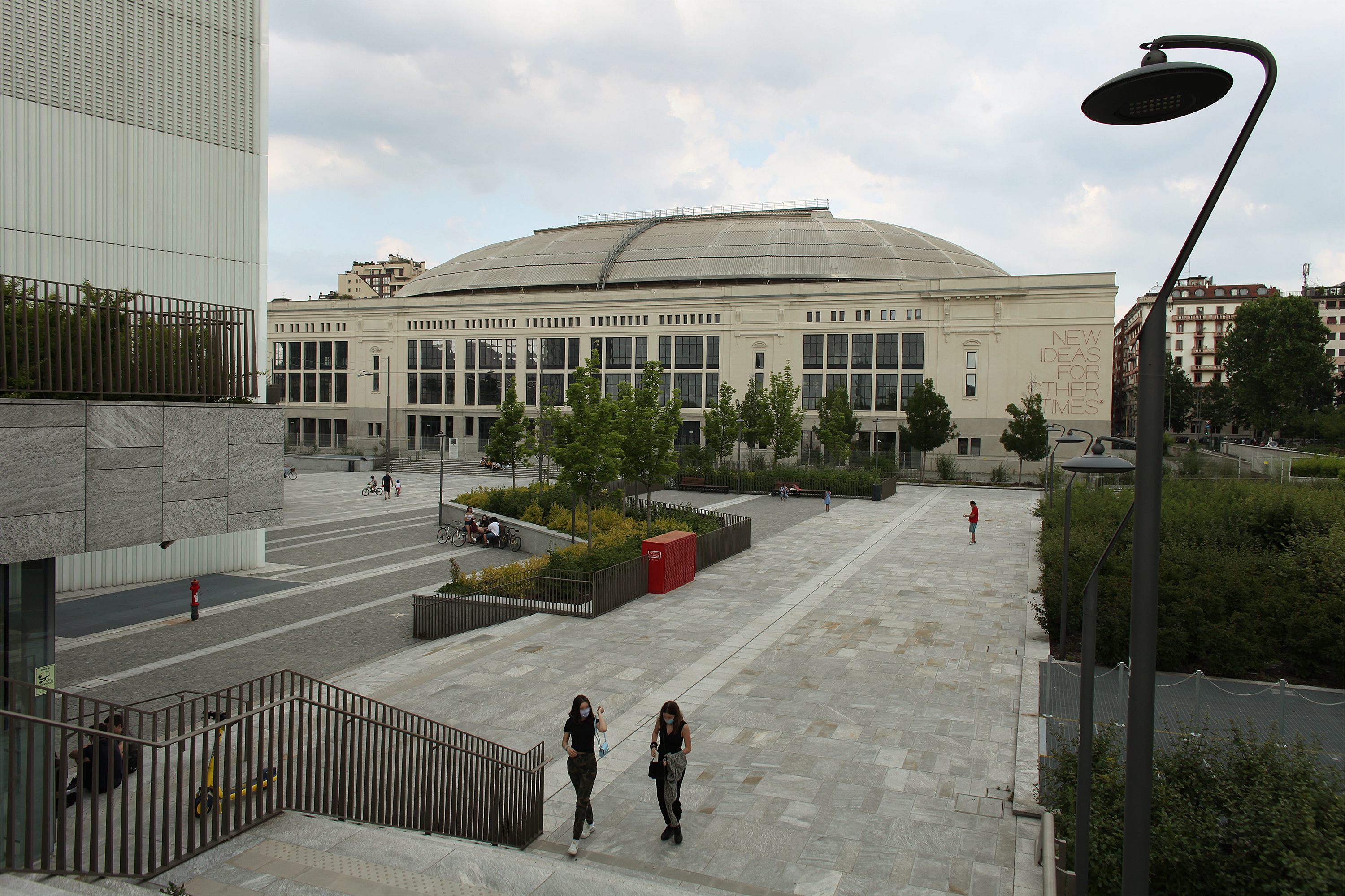 Ex Padiglione 3 della Fiera di Milano (1923), oggi parte di Citylife